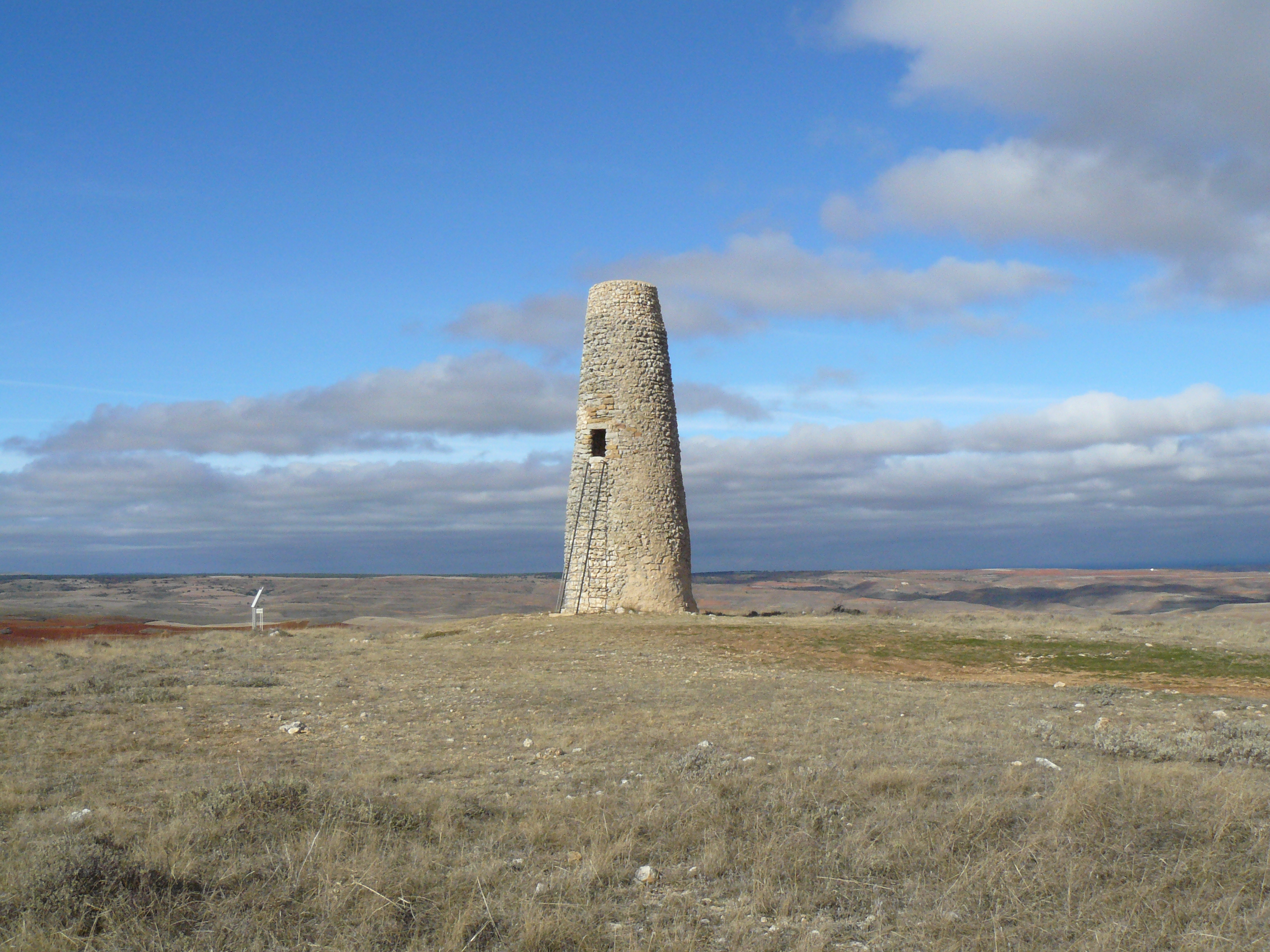 Atalaya islámica del Tiñón, Rello, Soria.